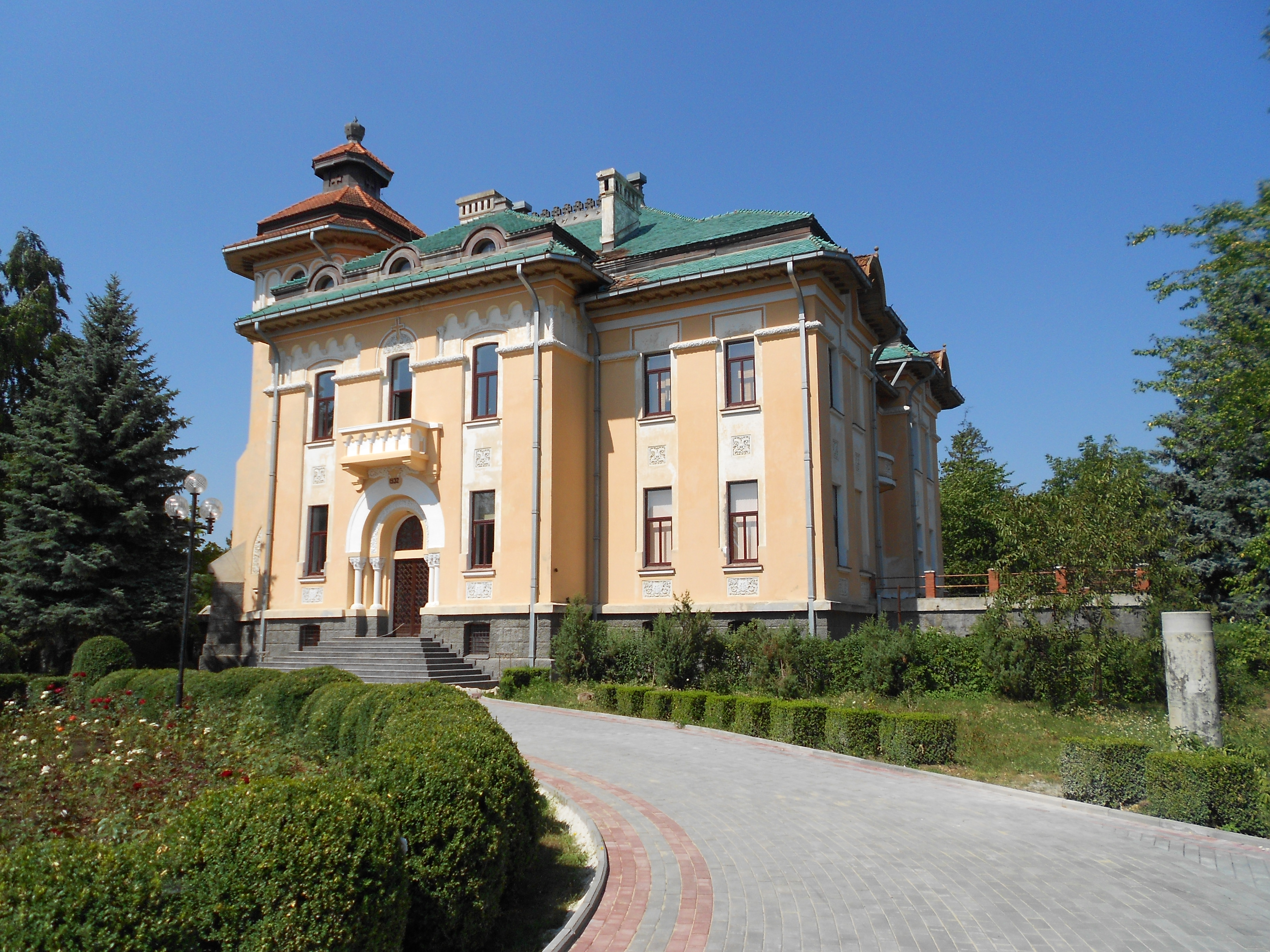 Reședința Episcopiei Hotinului